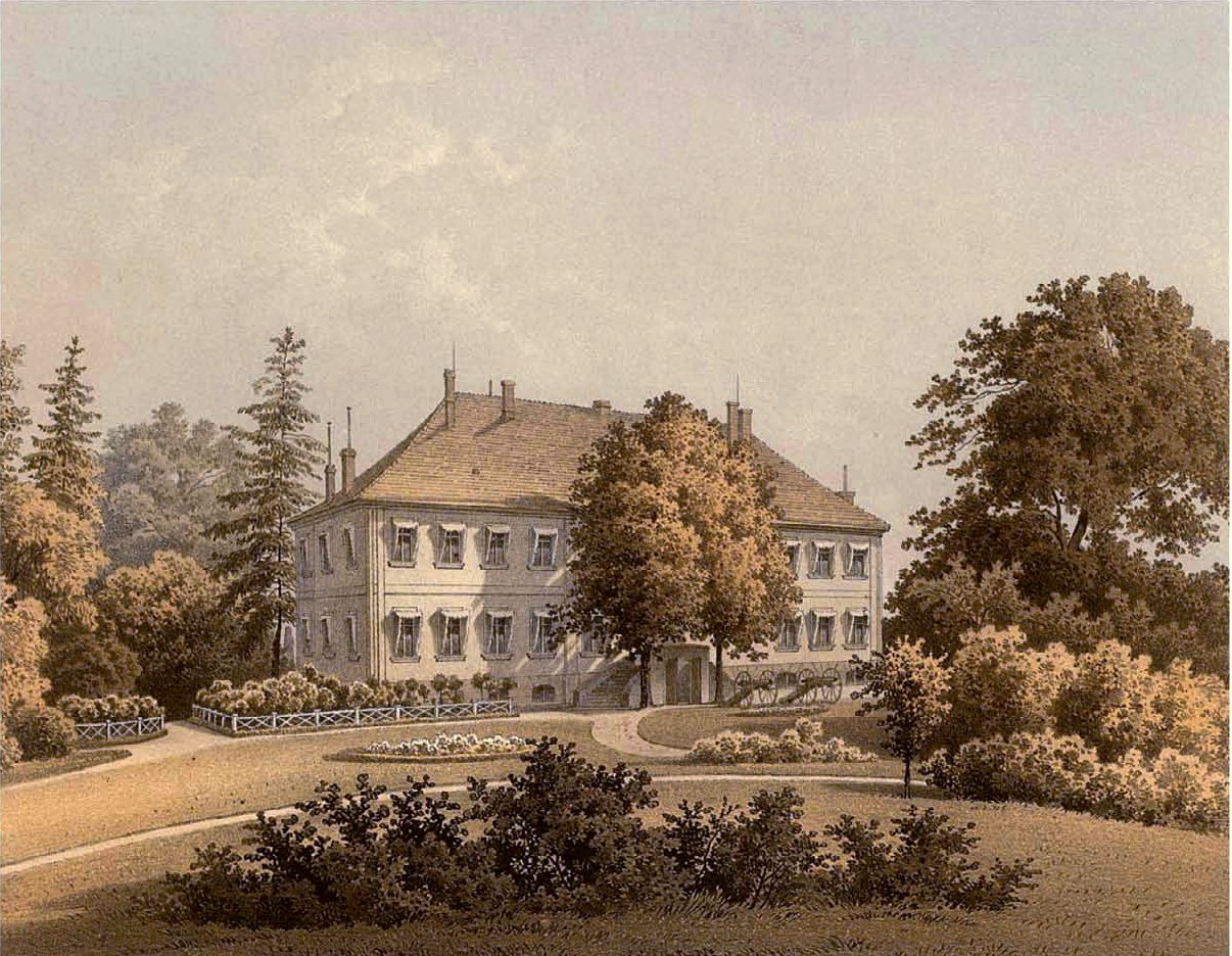 Rittergut Isterbies